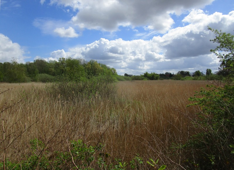 Holm Nor i Slesvig by